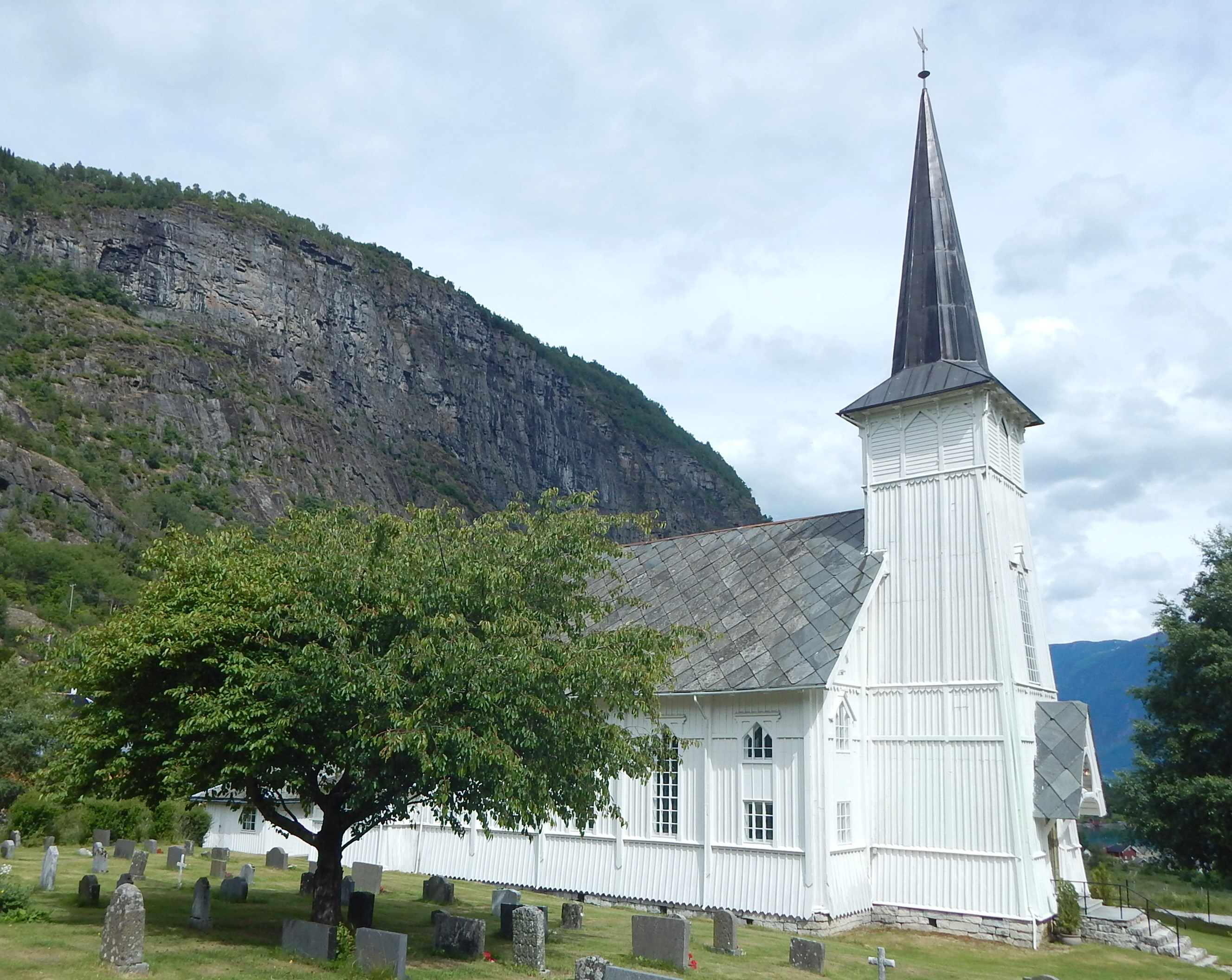 Solvorn kirke i Luster